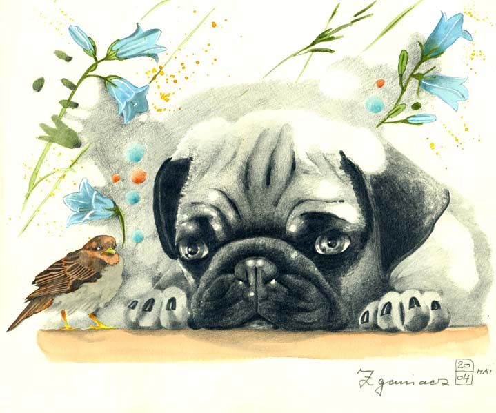 Frecher Spatz von Werner Zganiacz